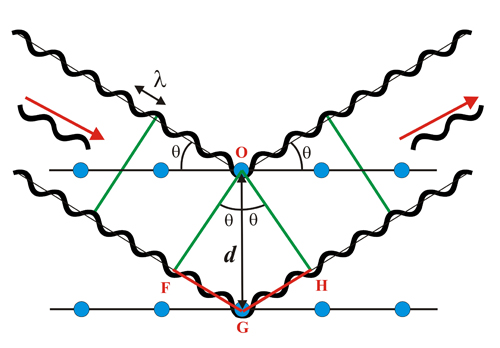 Bragg legea